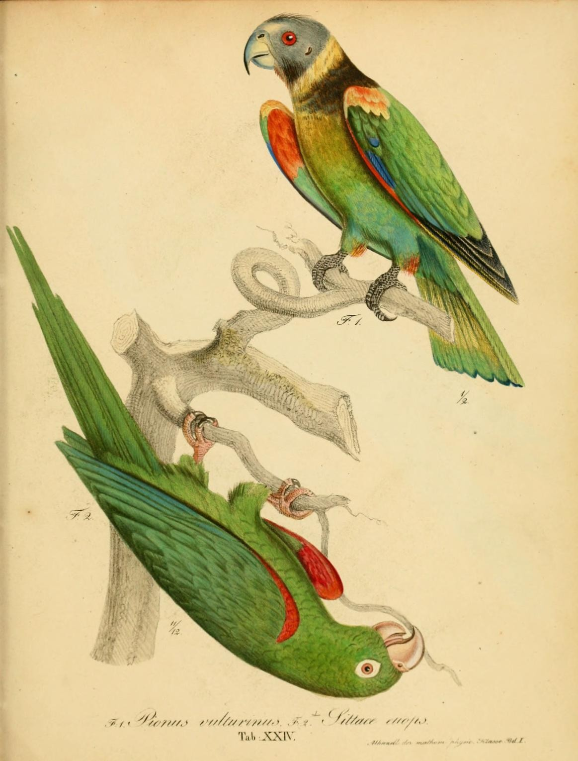 Tal. XX1\. . H*ttmt^.' y^ mu^M^f^ fnyj.r ••«/«*»» .V /